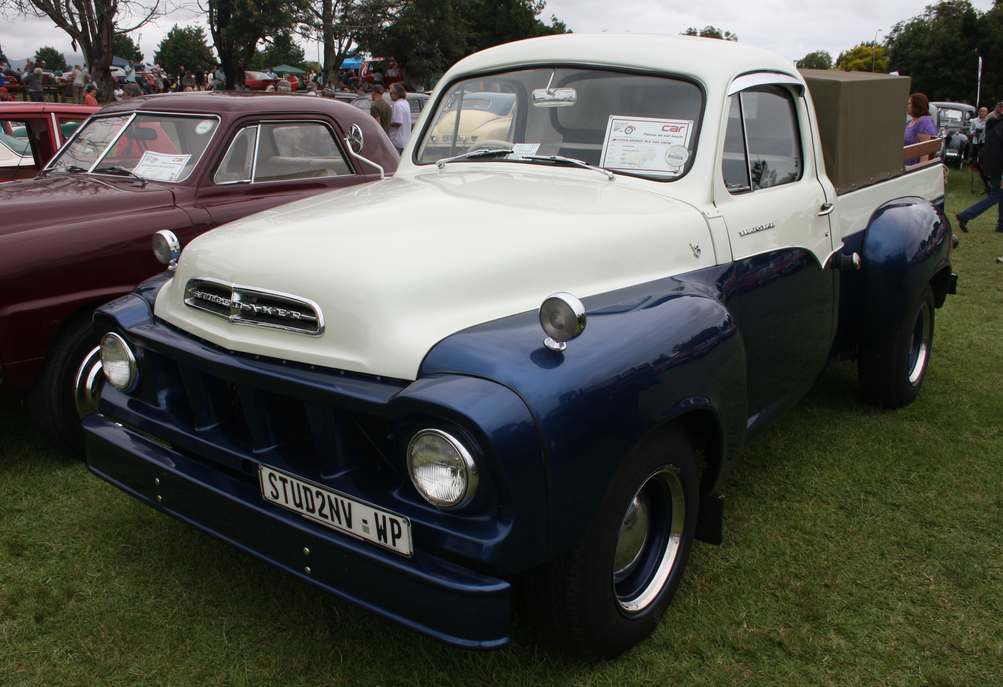 1957 Studebaker Transtar Pick Up